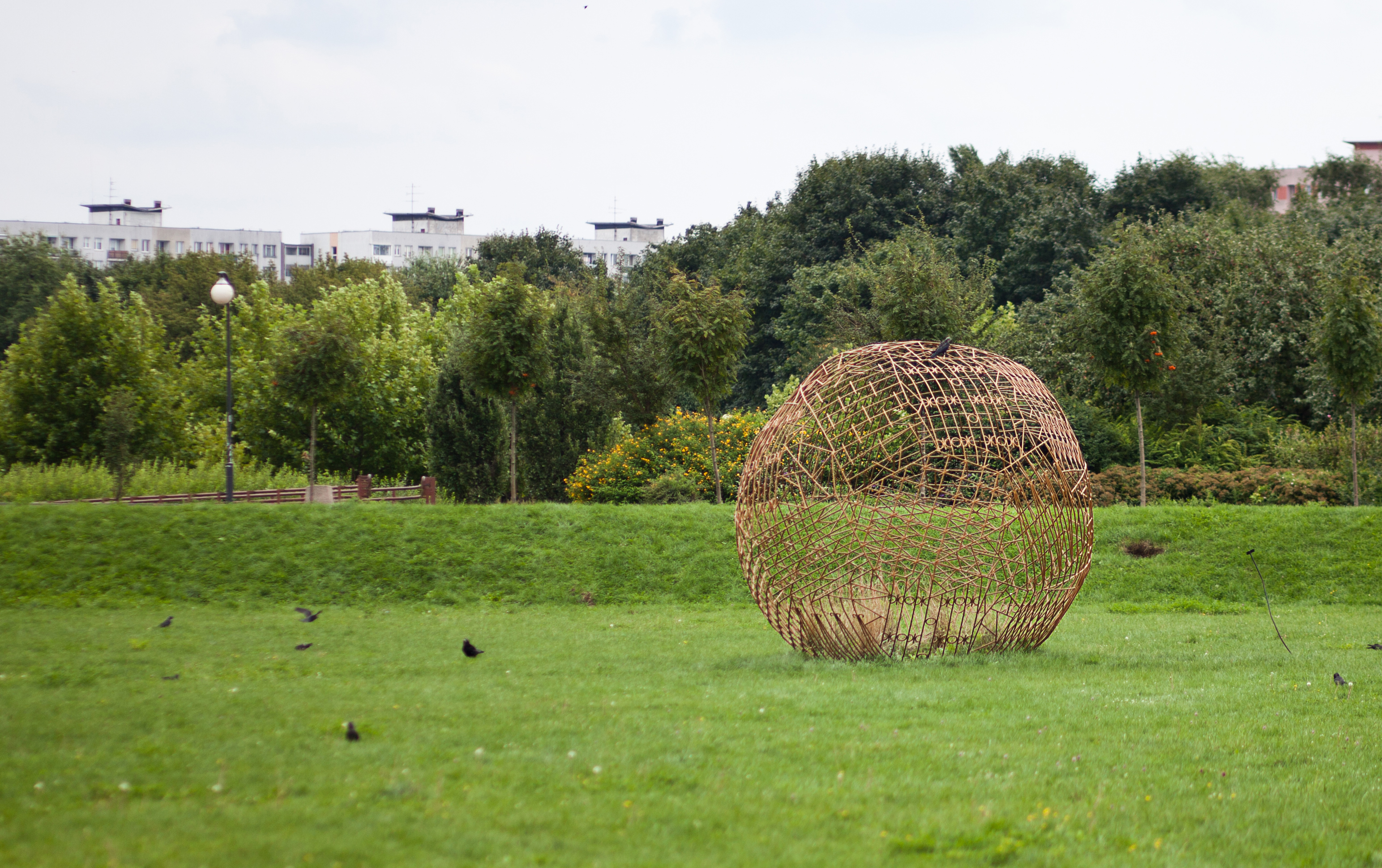 Rzeźba Moniki Sosnowskiej powstała w odniesieniu do lokalnej, polskiej tradycji rzeźby w przestrzeni publicznej (metaloplastyka, spawane struktury na placach zabaw i ogrodach etc.), co jest konsekwencją zainteresowań artystki modernistycznym dziedzictwem, ale także budowlanymi pomyłkami i amatorskim, oddolnym kształtowaniem przestrzeni wspólnej i prywatnej przez mieszkańców osiedli z wielkiej płyty. Rzeźba Sosnowskiej to zainstalowana bezpośrednio na ziemi kula „ulepiona” z ornamentalnie ukształtowanych prętów zbrojeniowych. Powstała jako rezultat obserwacji kształtów i wzorów krat montowanych przez mieszkańców Bródna, które zabezpieczają mieszkania na parterze, kioski i sklepy przed włamaniem.